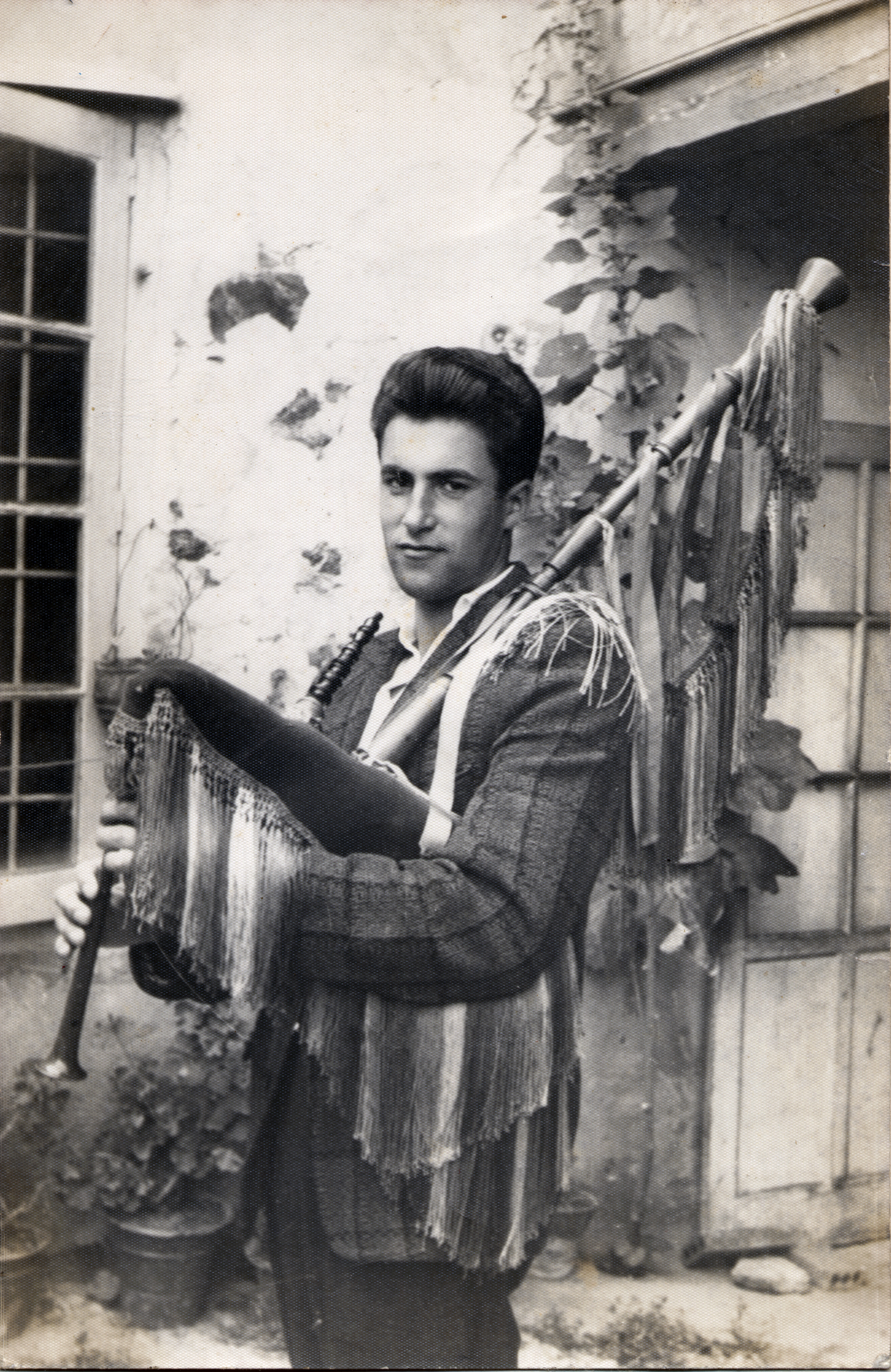 Alberto Fernández Velasco, Berto Velasco, tocando la gaita con 16 años - 1958